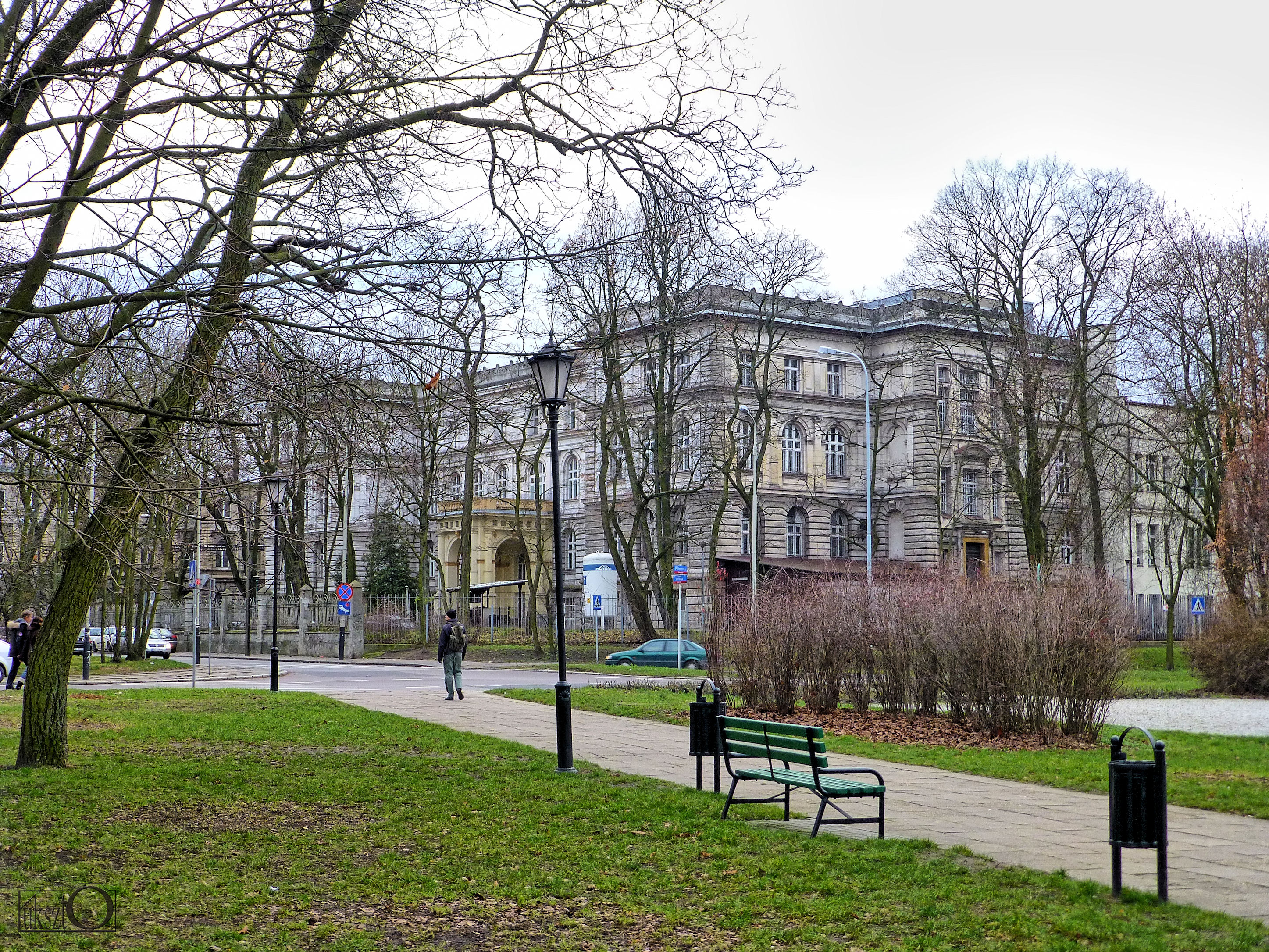 Łódź, ul. Sterlinga Seweryna 1-3 Uniwersytecki Szpital Kliniczny nr 3 im. WAM - Centralny Szpital Weteranów